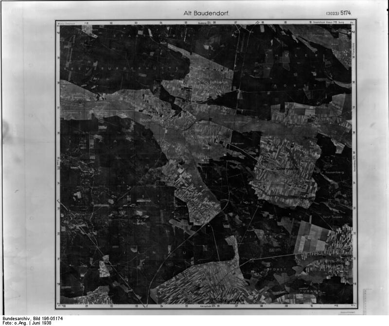 Alt Baudendorf